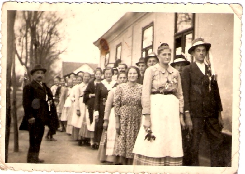 Der Kerweihzug zieht durchs ganze Dorf, allen voran das Vortänzerpaar, und dahinter die weiteren Kerweihpaare. Hier sind sie noch nicht in ihre festliche Tracht gekleidet. Links neben dem Festzug steht der "Kerweihvater" (hier Traum Karl) zuständig für die gesamte Organisation des Kirchweihfestzuges. Dieses Foto stammt aus 1940